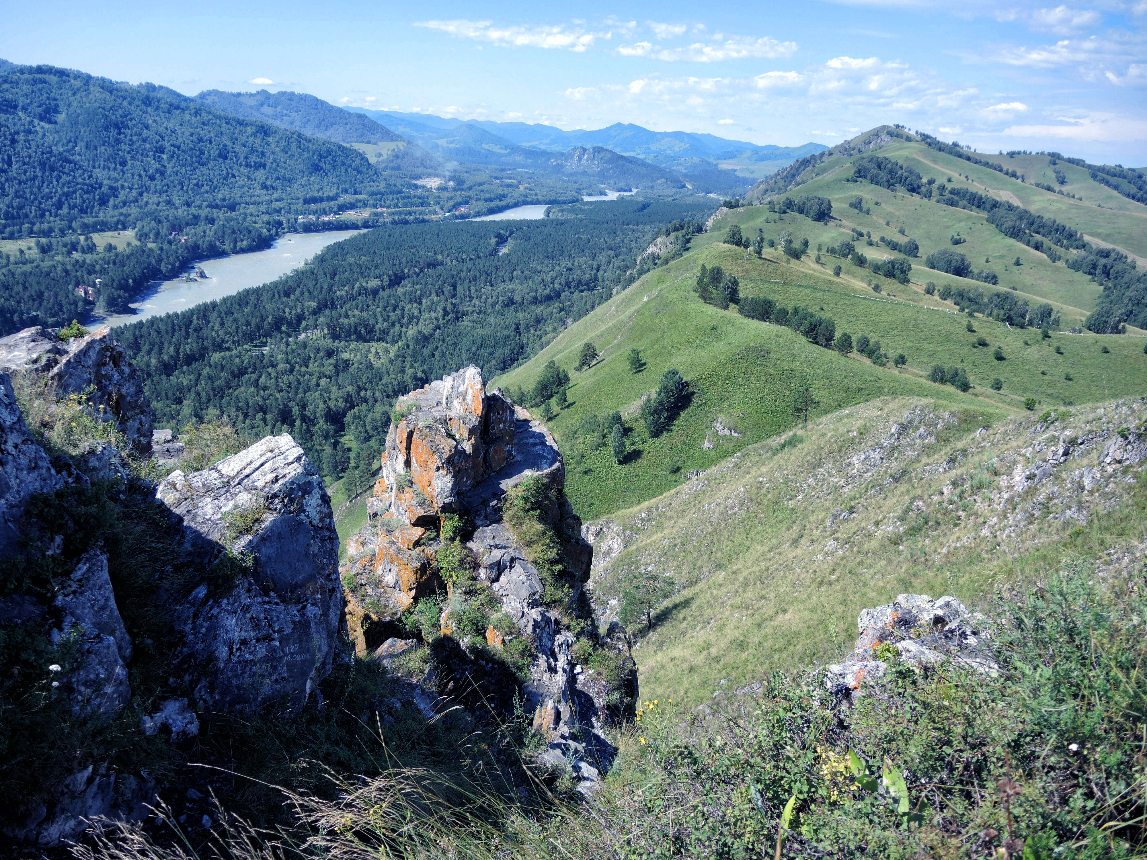 Айский заказник: Алтайский район, Алтайский край This image is related to the protected area of Russia number 2210002